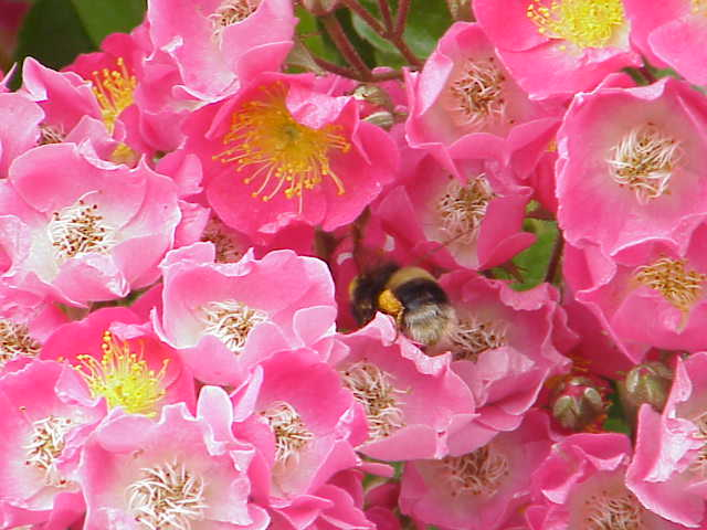 Species: Rosa sp. Family: Rosaceae Cultivar: Maria Lisa, Liebau 1936 Image No. 186